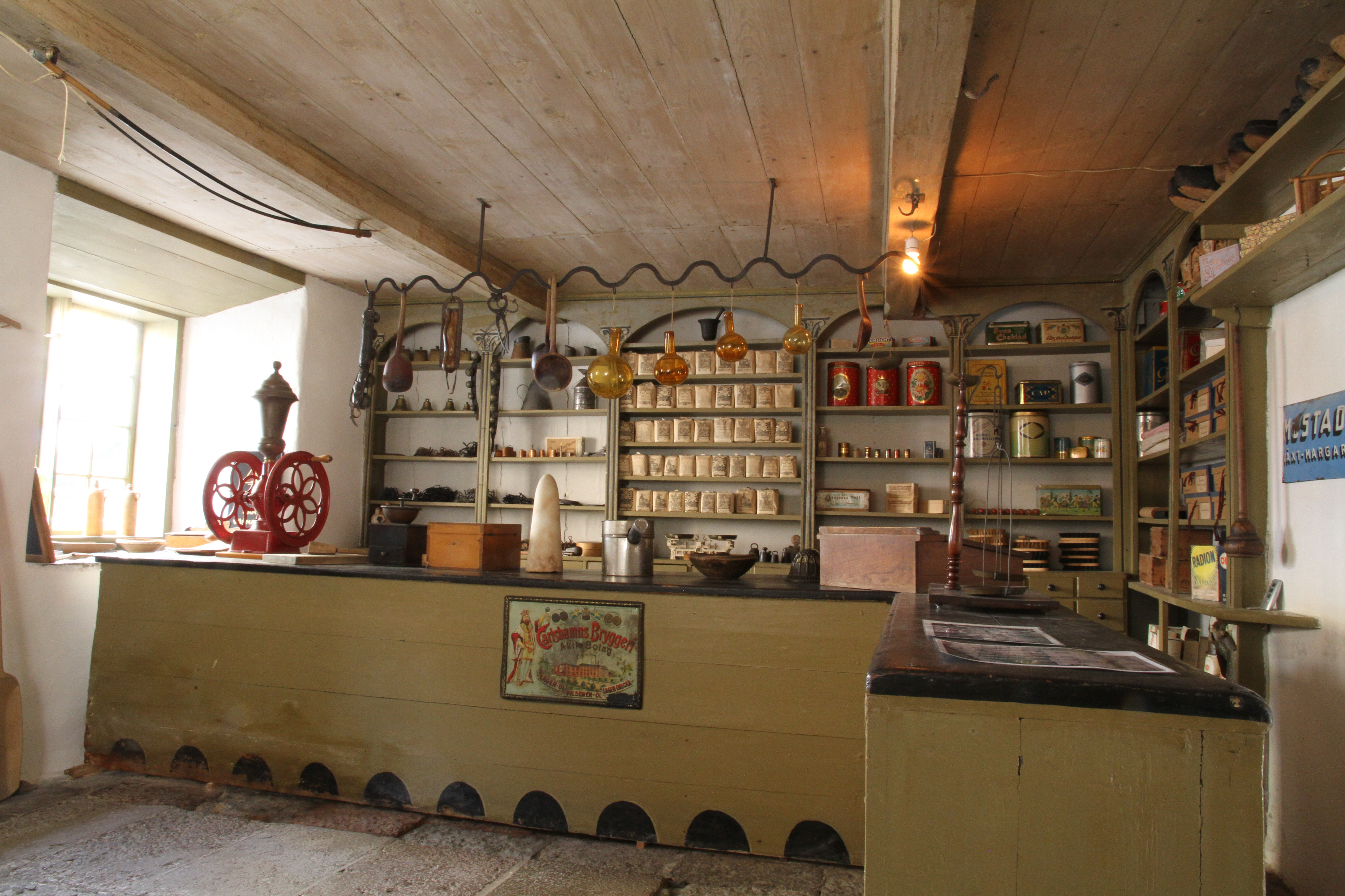 Skottbergska gården, Karlshamn 21 juli 2015